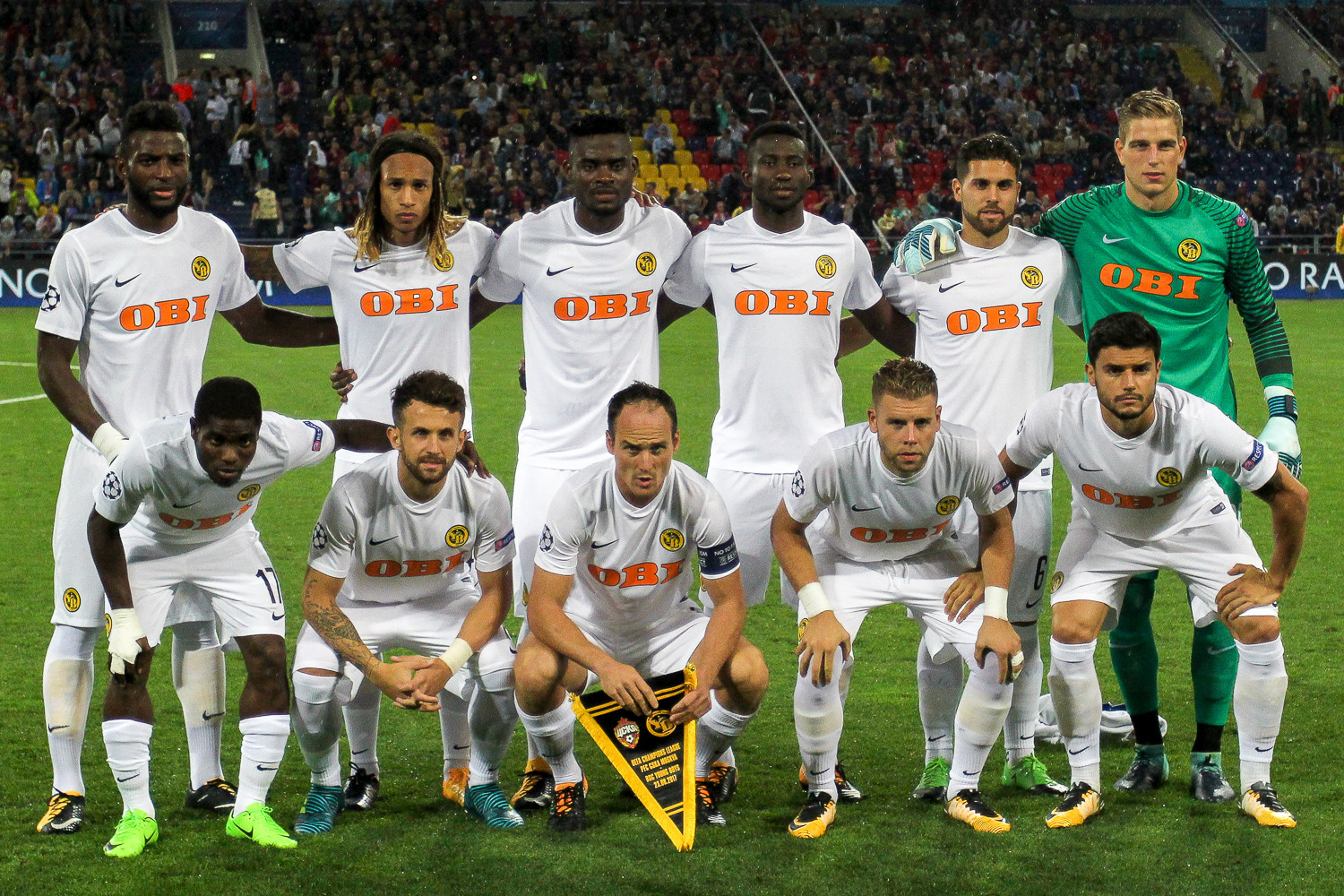 Startaufstellung der BSC Young Boys beim CL-Quali-Match gegen den ZSKA Moskau